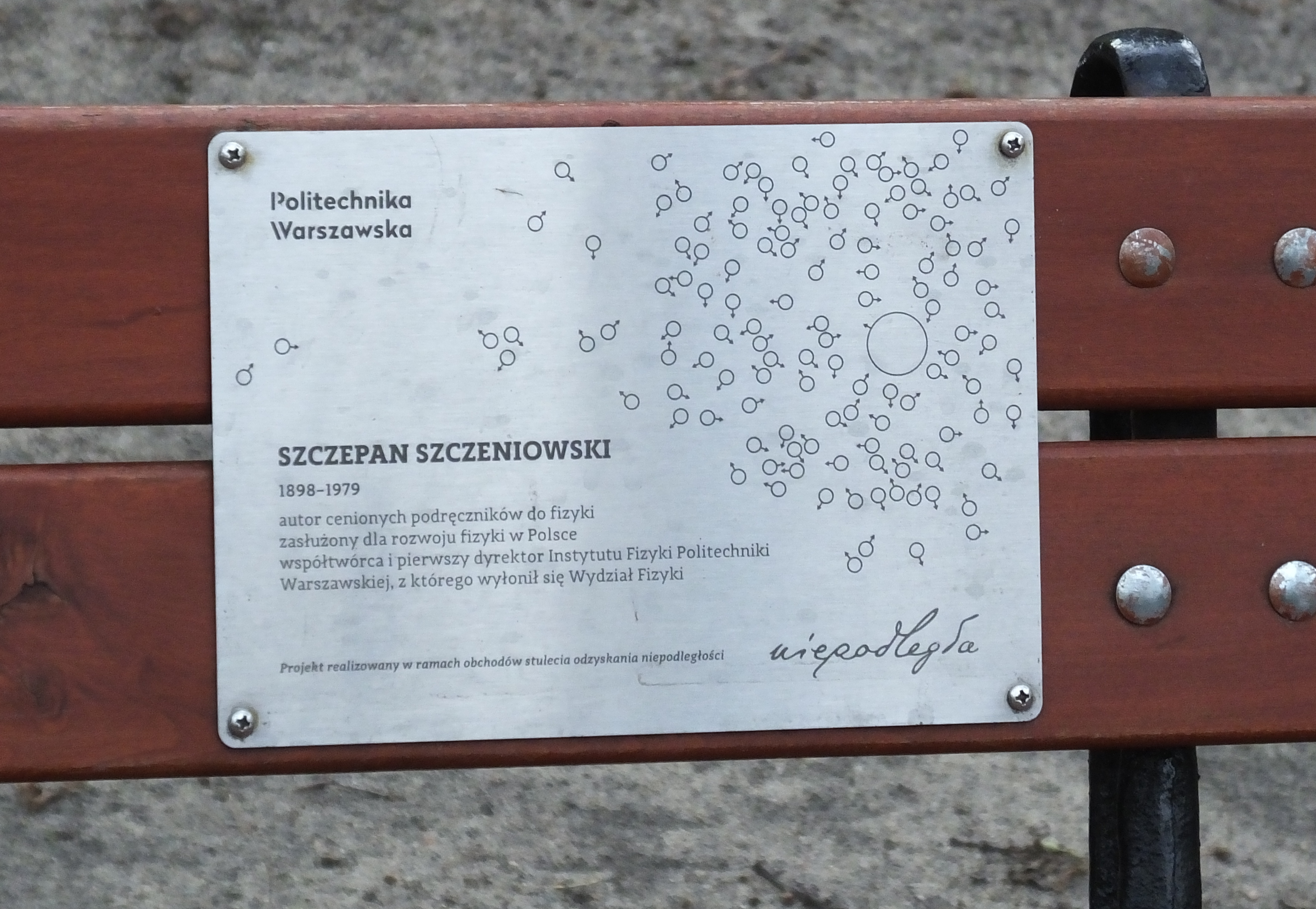 Jedna z Ławek z historią na dziedzińcu Politechniki Warszawskiej